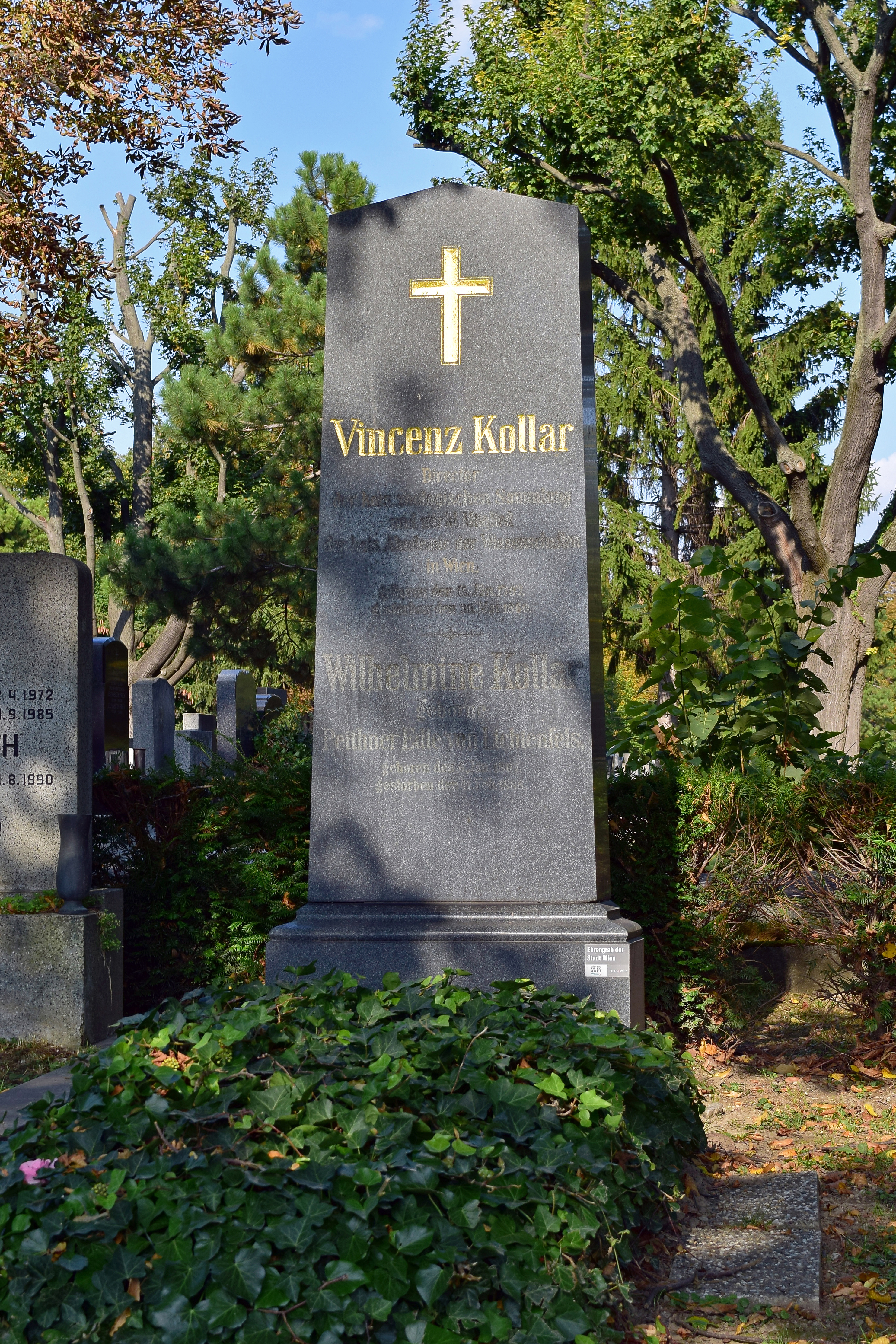 Ehrenhalber gewidmetes Grab von Vincenz Kollar auf dem Wiener Zentralfriedhof, Gruppe 3, Reihe 4, Nr. 39 A